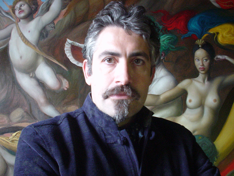 Portret of Giovanni Tommasi Ferroni